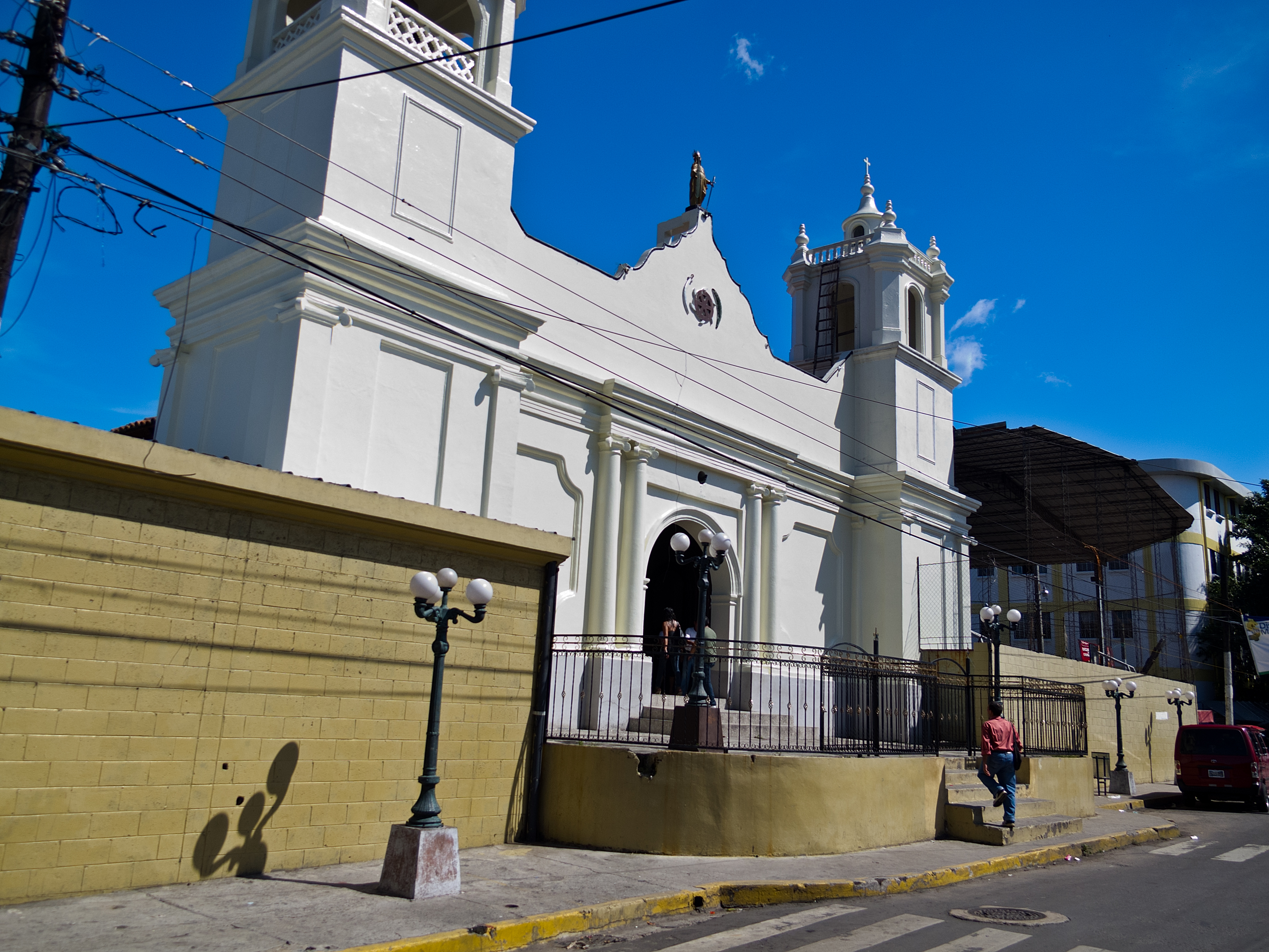 Catedral en Apopa, frente Parque Central/Alcaldia